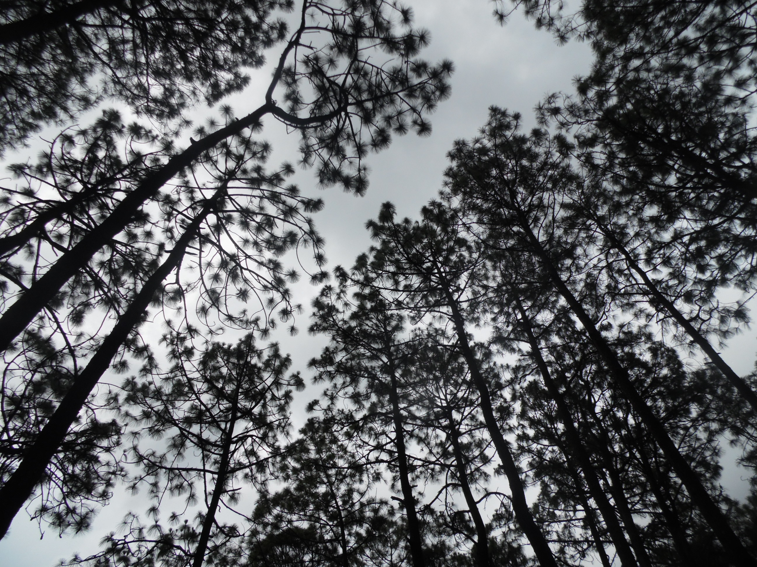 Hacía mucho frío en Mazamitla, Jalisco.